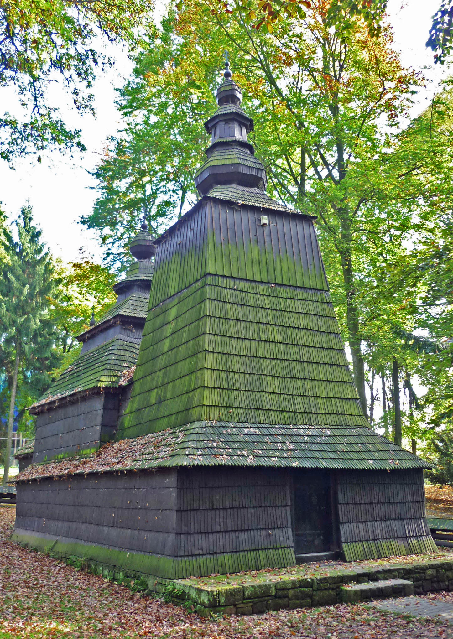 Orthodoxe Nikolauskirche im Jirasek-Park in Königgrätz (Hradec Králové)